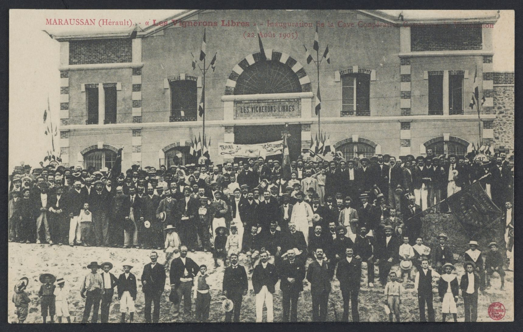 Maraussan. - "Les Vignerons libres", inauguration de la cave coopérative le 22 août 1905 : carte postale.